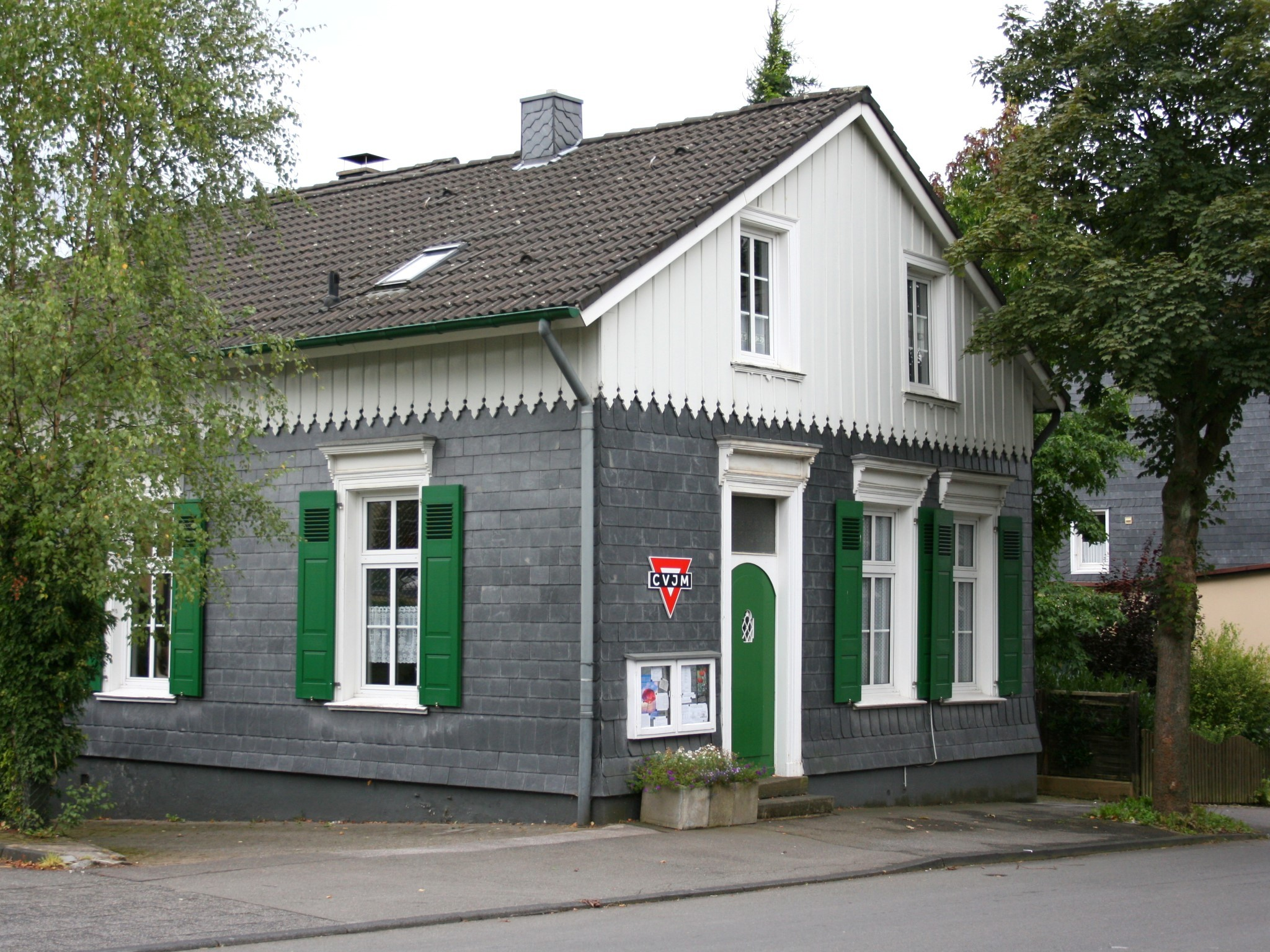 Wuppertal-Ronsdorf, Innenstadt